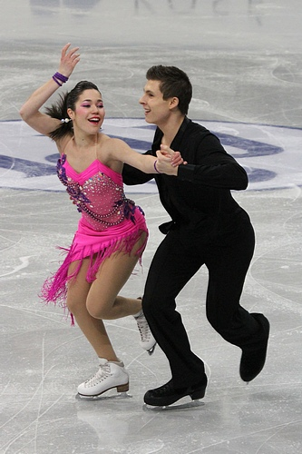 Селия Робледо и Луис Фенеро (Испания) на чемпионате мира по фигурному катанию среди юниоров 2012